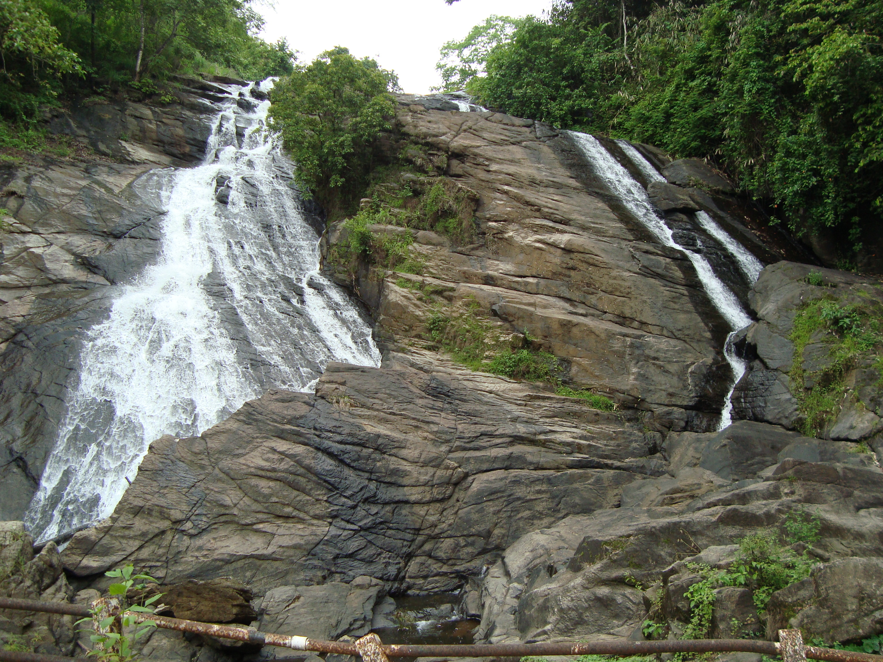 ചാര്‍പ്പ വെള്ളച്ചാട്ടം